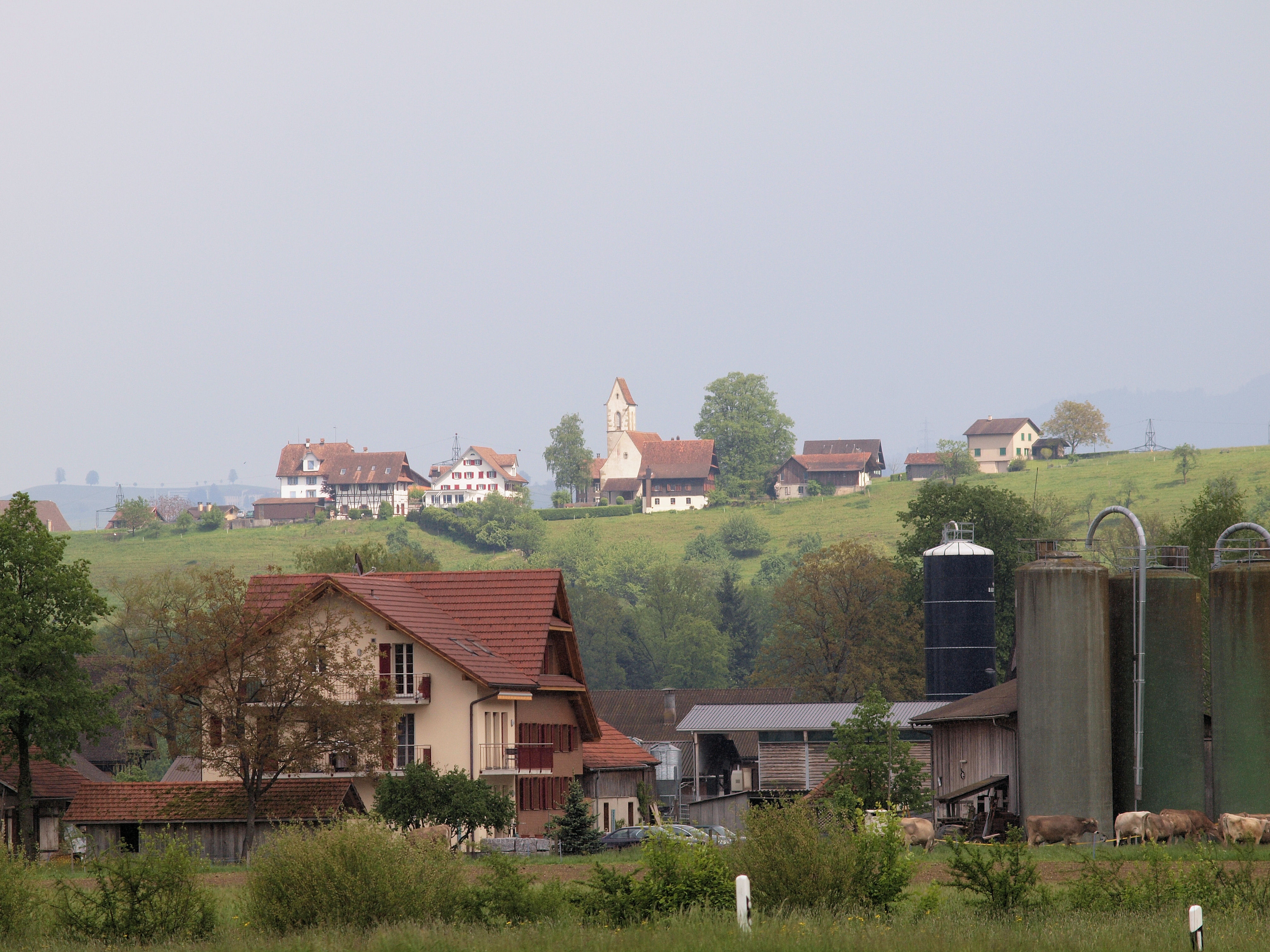 Auf dem Hügelzug befindet scih die Siedlung St. Wolfgang. Aufgenommen von Zollbrück (Beides Gemeinde Hünneberg)